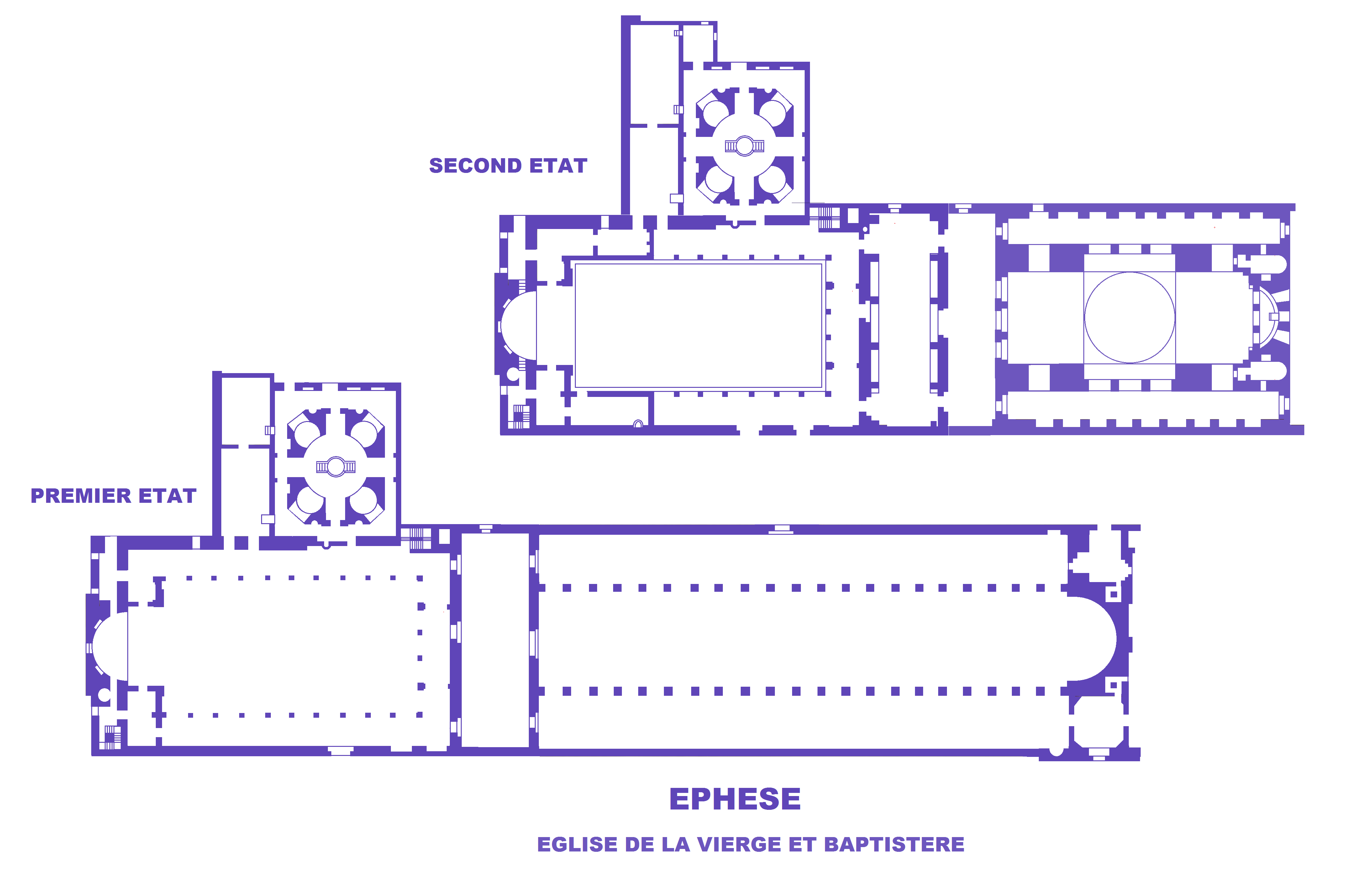 Ephèse, Eglise de la Vierge, plans des deux états